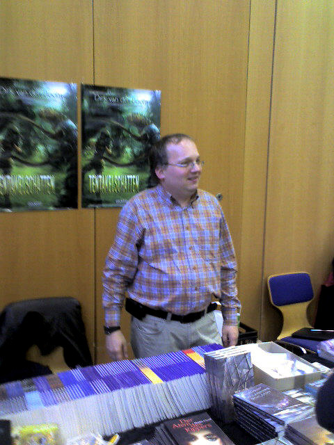 Dirk van den Boom auf dem Buchmesseon 2008